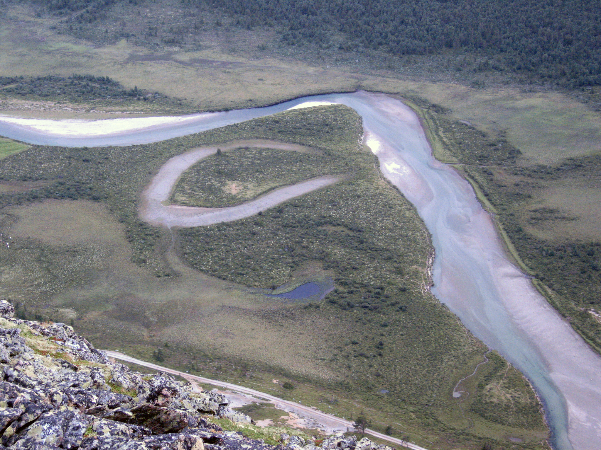 Finna med kroksjø rett under Klympen